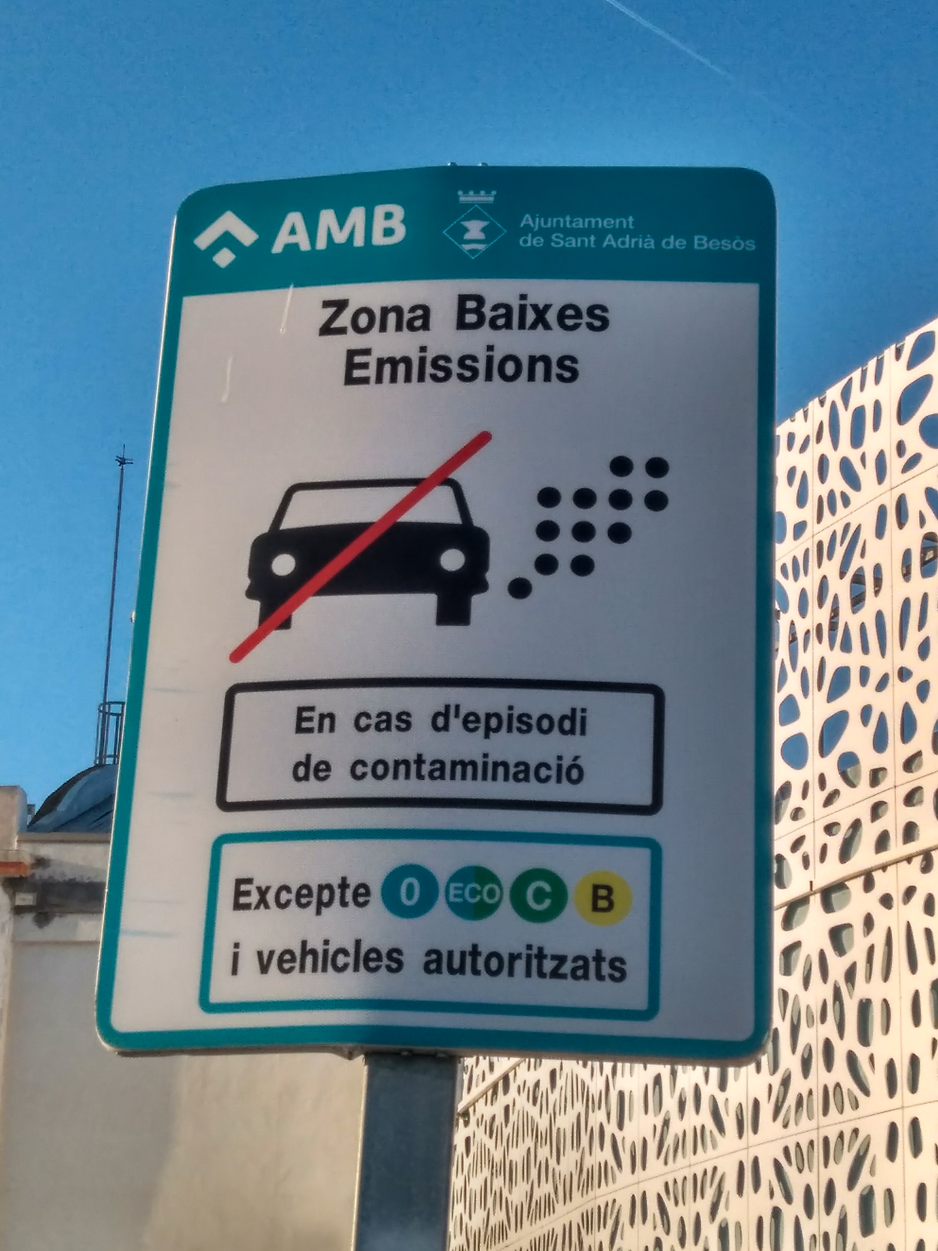 Rètol indicatiu de l'inici de la Zona de Baixes Emissions Rondes Barcelona, situat en la cantonada entre l'Av Eduard Maristany (Sant Adrià de Besòs) i l'Av Maresme (Badalona)